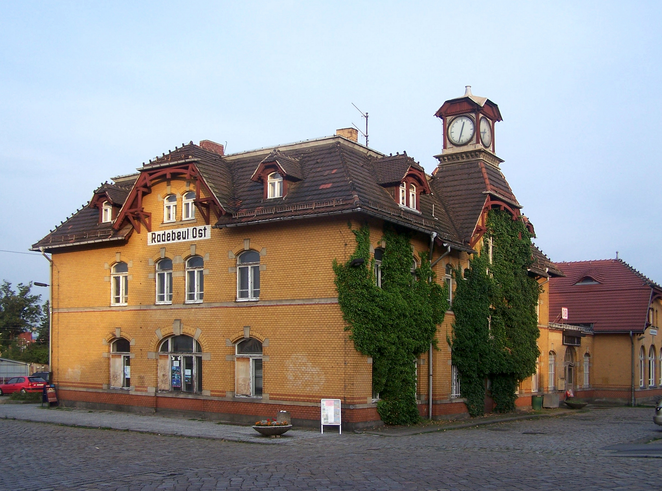 Bahnhof Radebeul Ost, Empfangsgebäude, Radebeul, Sachsen, Deutschland